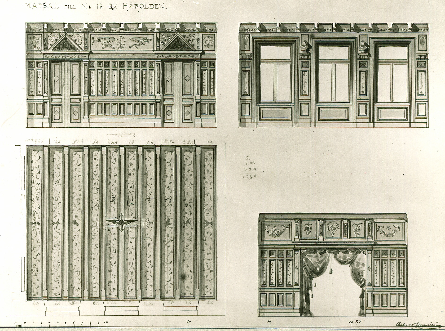 Rügheimer & Beckers stråhattfabrik, skisser för matsalen utförda av arkitekt Alfred Hellerström